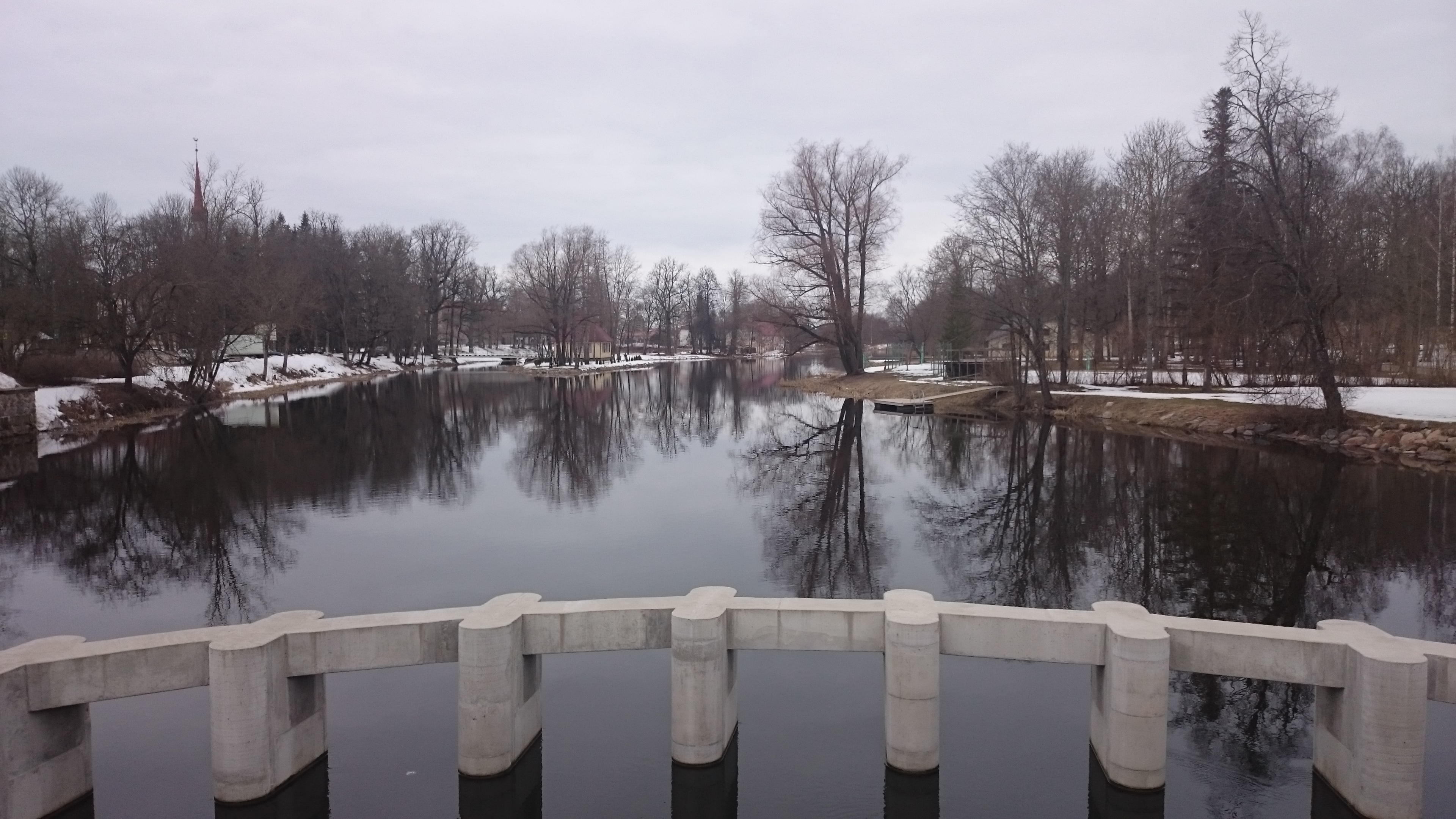 Põltsamaa à Põltsamaa